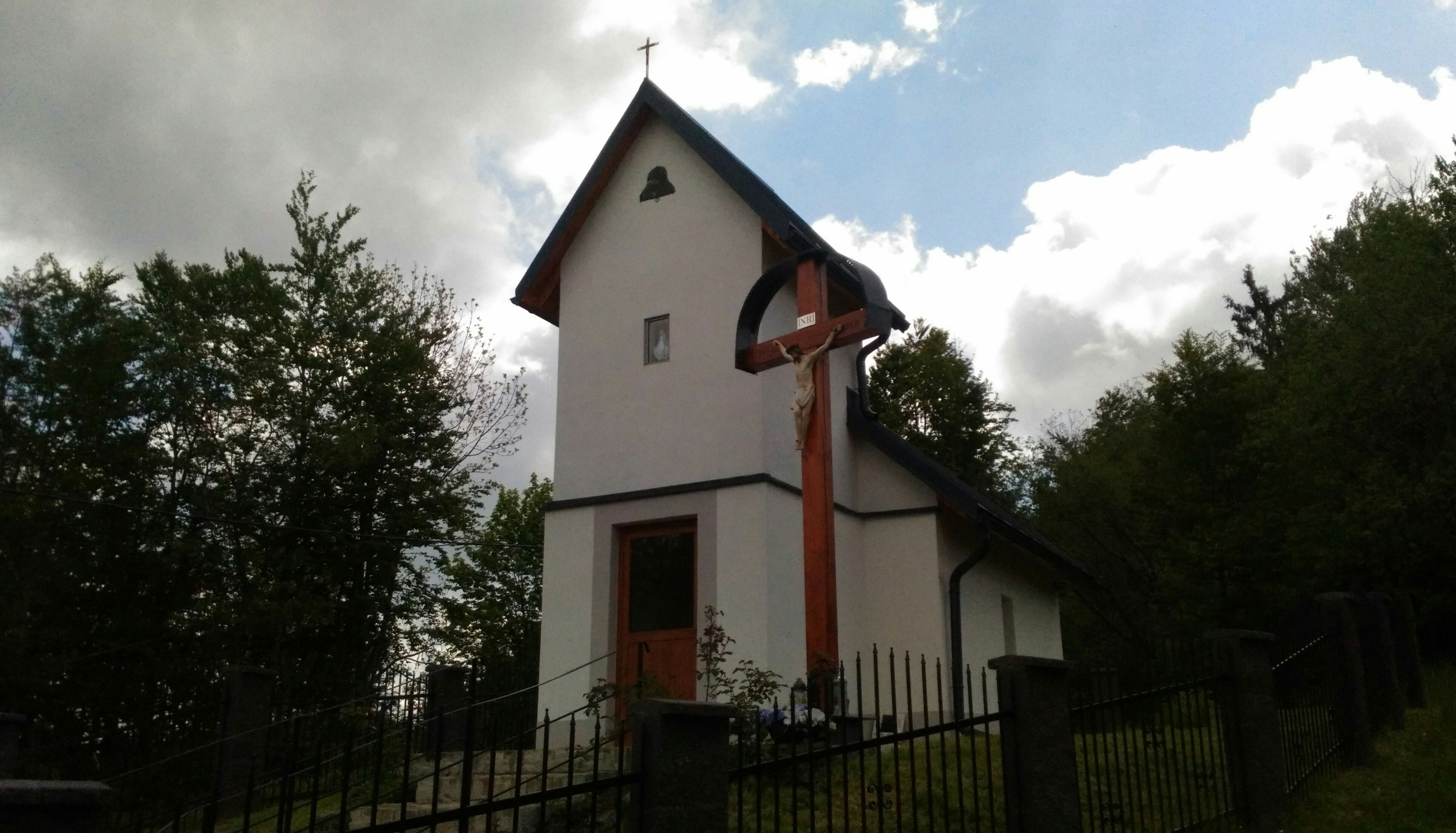 Kaplnka Ružencovej Panny Márie v osade Murčovci (v meste Čadca, mestská časť Vojty). Kaplnka bola postavená v roku 1946, opravená v roku 2018.